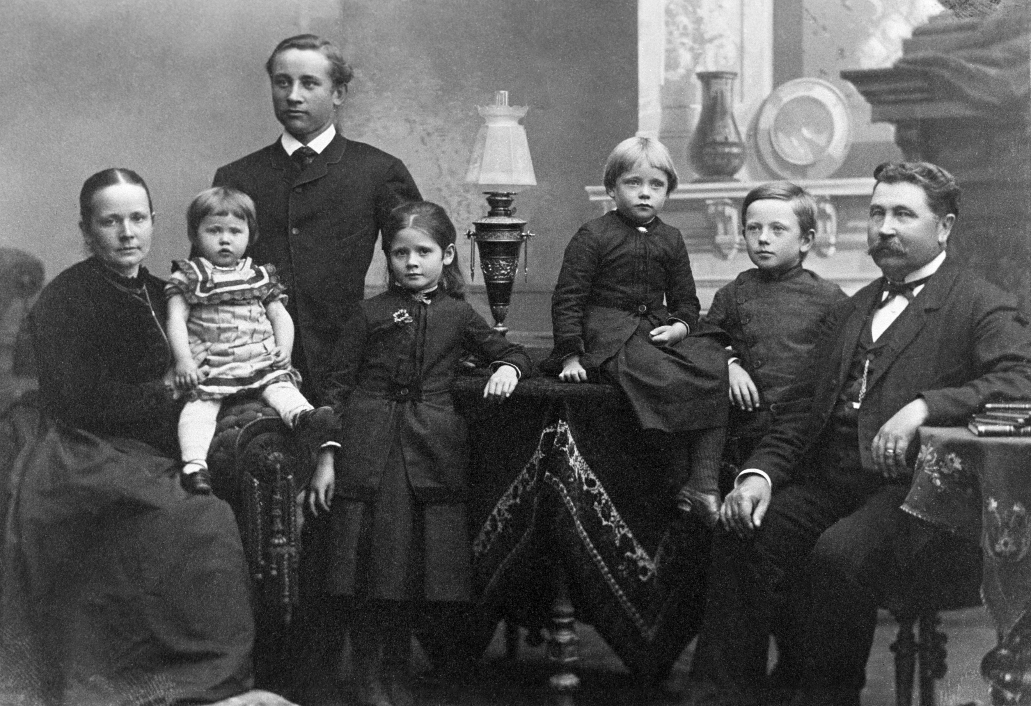 Urkuri Lauri Hämäläisen ja vaimonsa Emma Kekonin perhe, mm. tytär Aino vuonna 1888